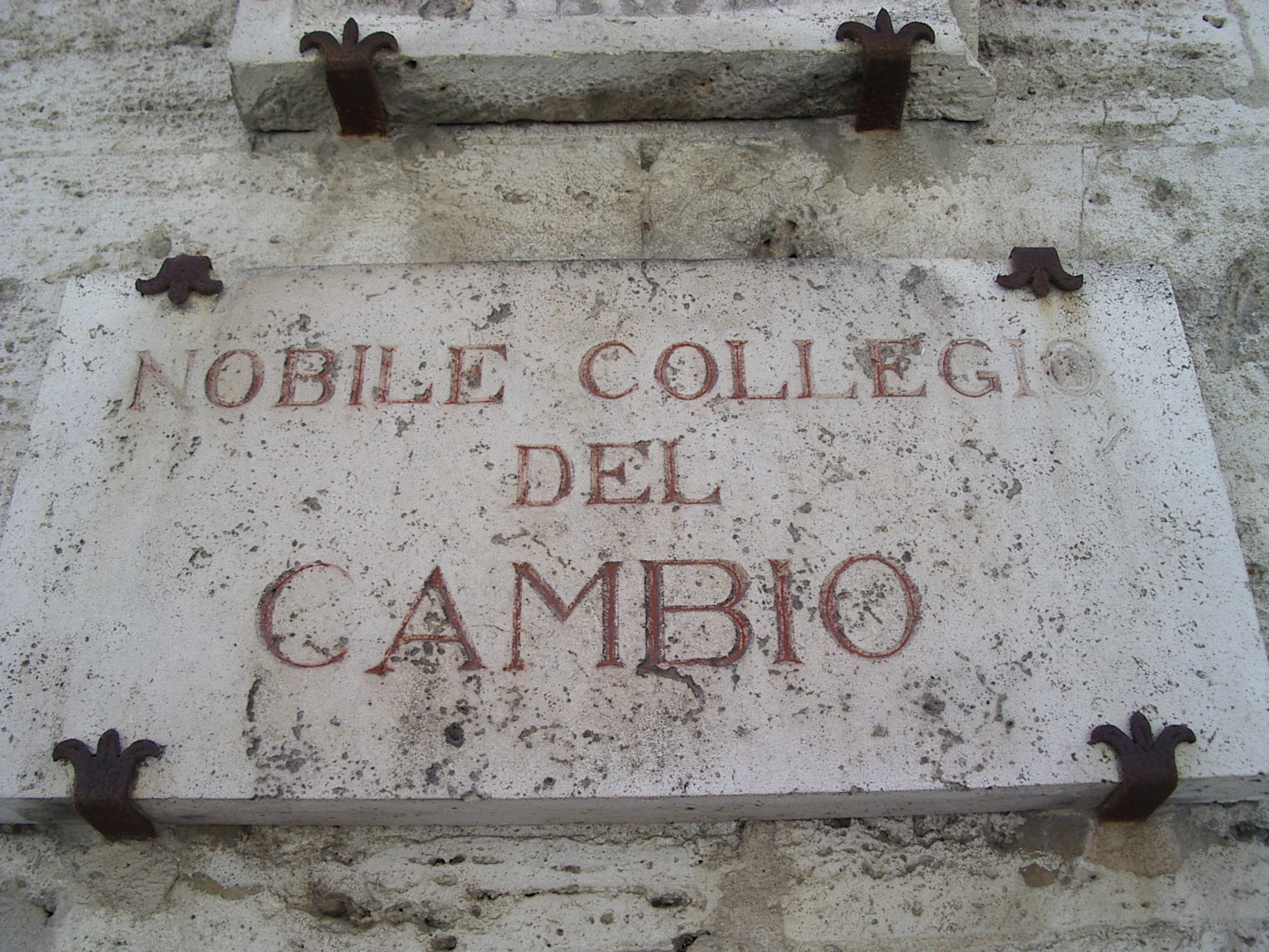 Plaque indication Collegio del Cambio-Pérouse-Italie